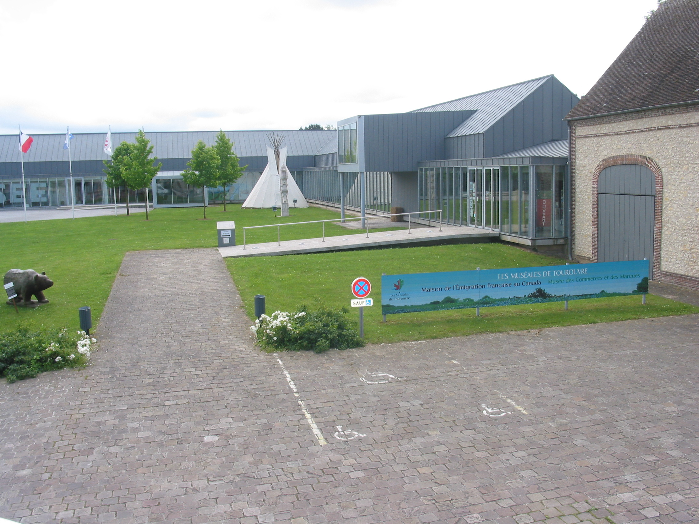 Musée de l’Émigration française du Canada - Musée des Commerces et des Marques